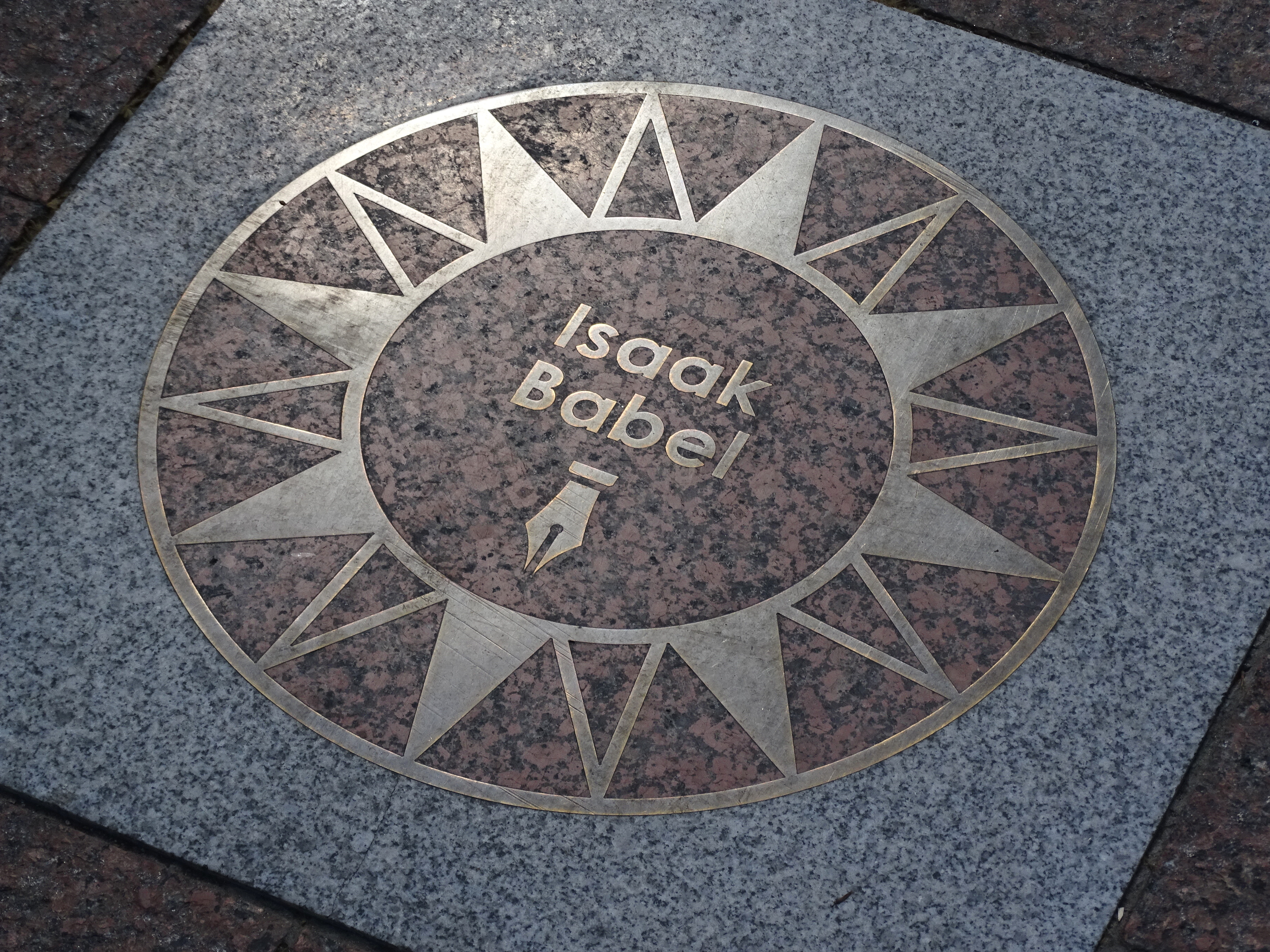 Street Plaque for Isaak Babel - Odessa - Ukraine